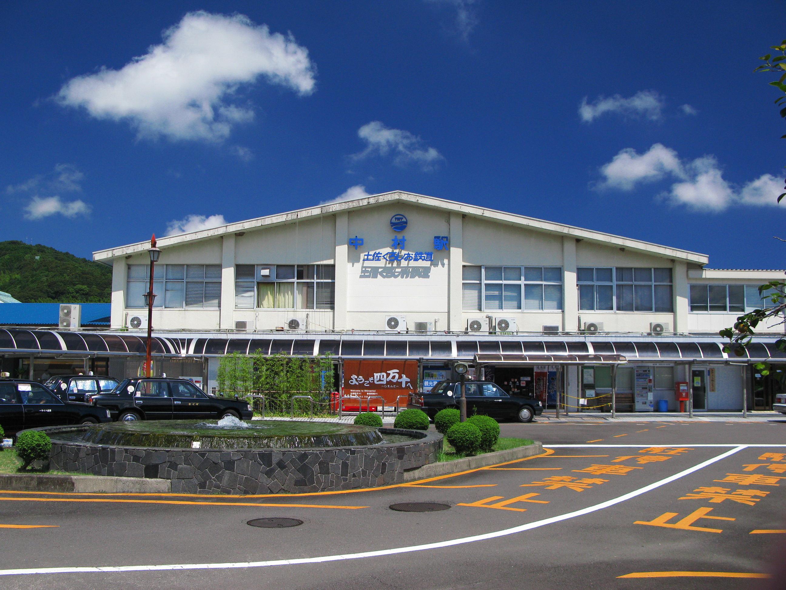 中村駅駅舎